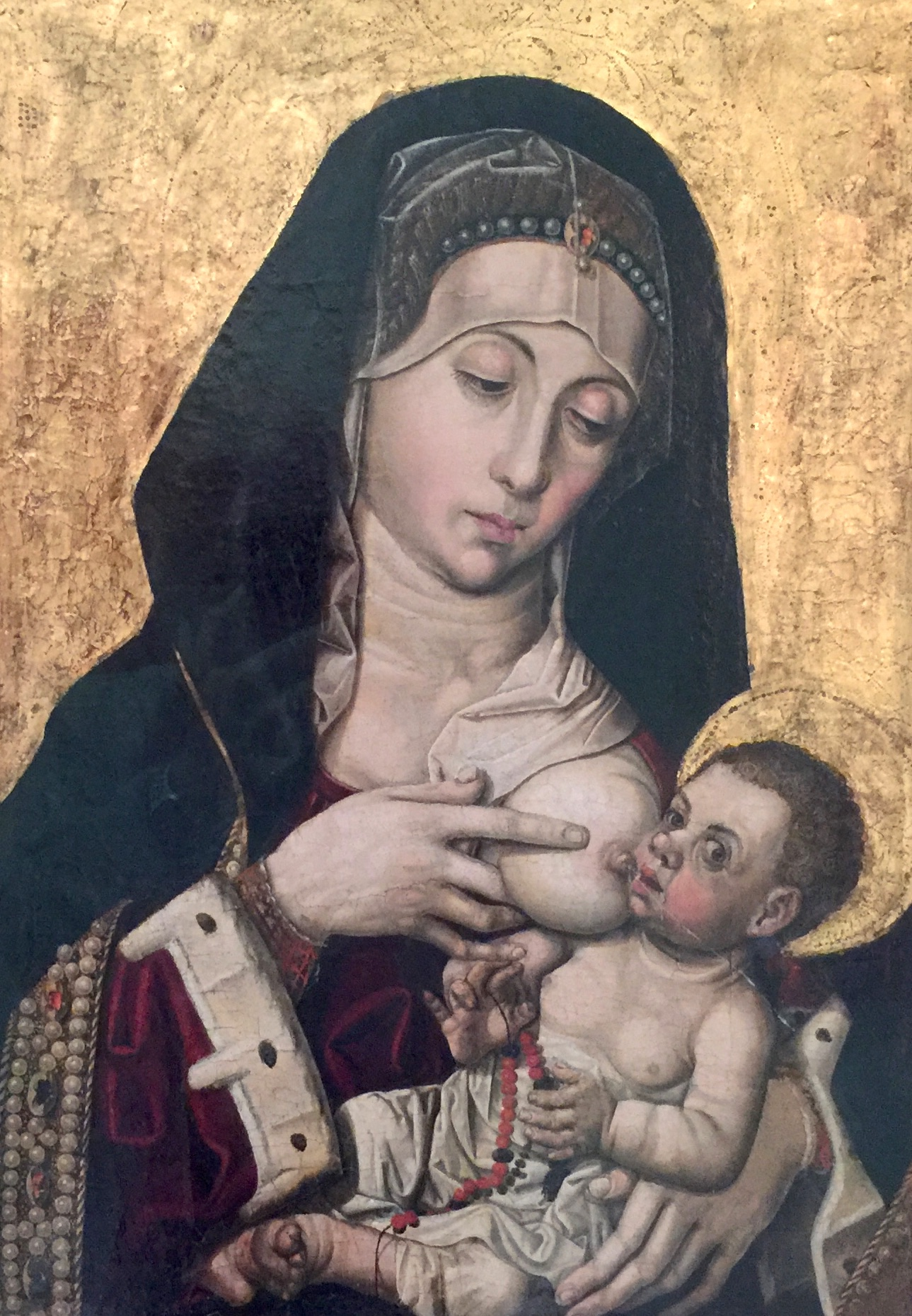 Huile sur bois. Seconde moitié du XVe s. Musée des beaux-arts de Valence (Espagne).